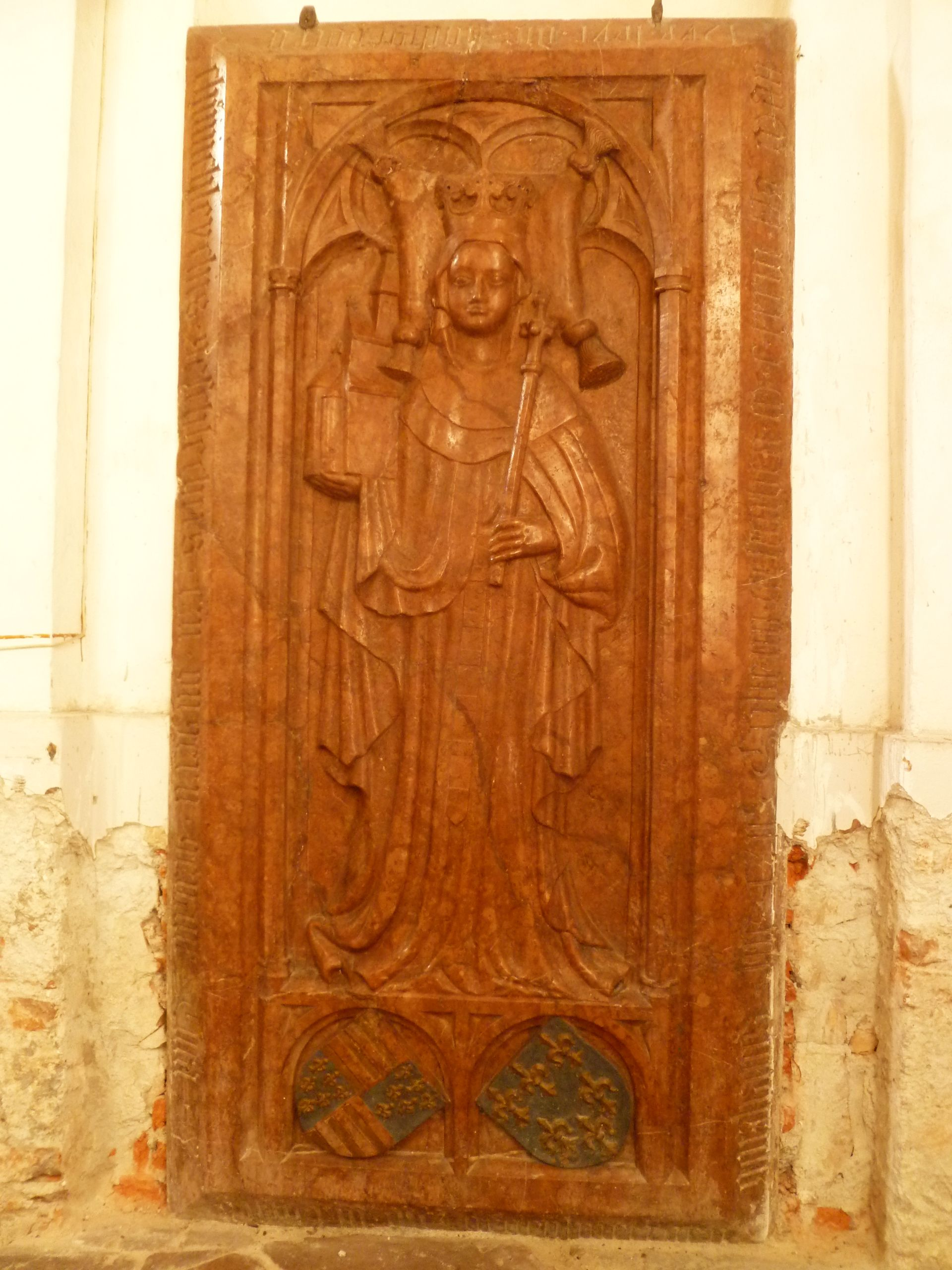 Epitaph der Tuta von Formbach in der Pfarrkirche von Suben